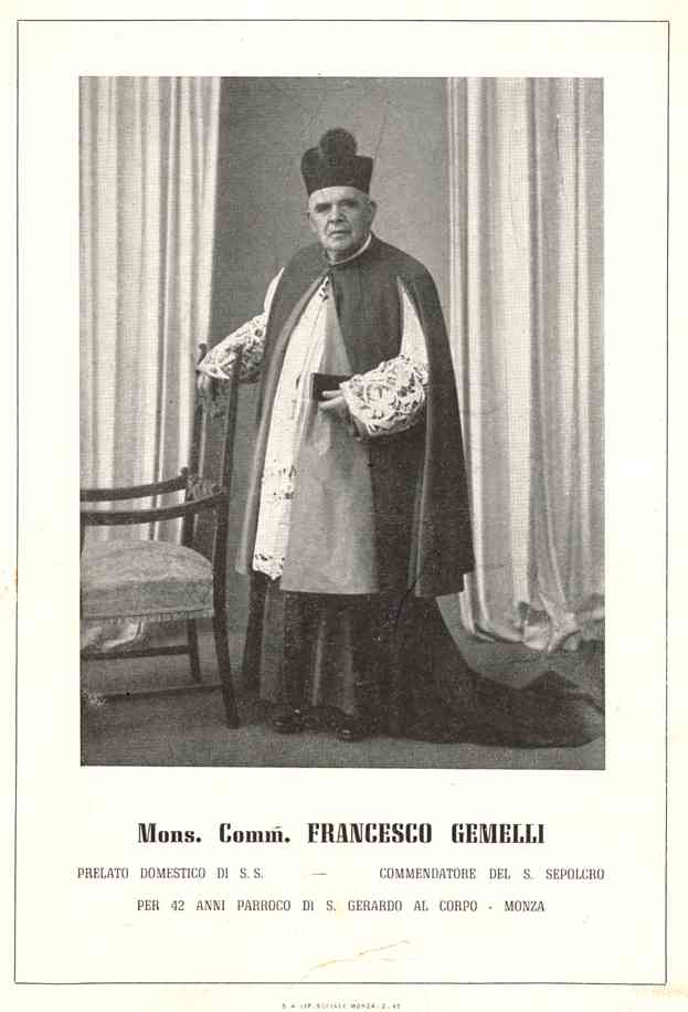 MB Monza Mons. Comm. Francesco Gemelli prelato domestico di S.S. -- commendatore del S. Sepolcro - per 42 anni parroco di S. Gerardo al Corpo di Monza